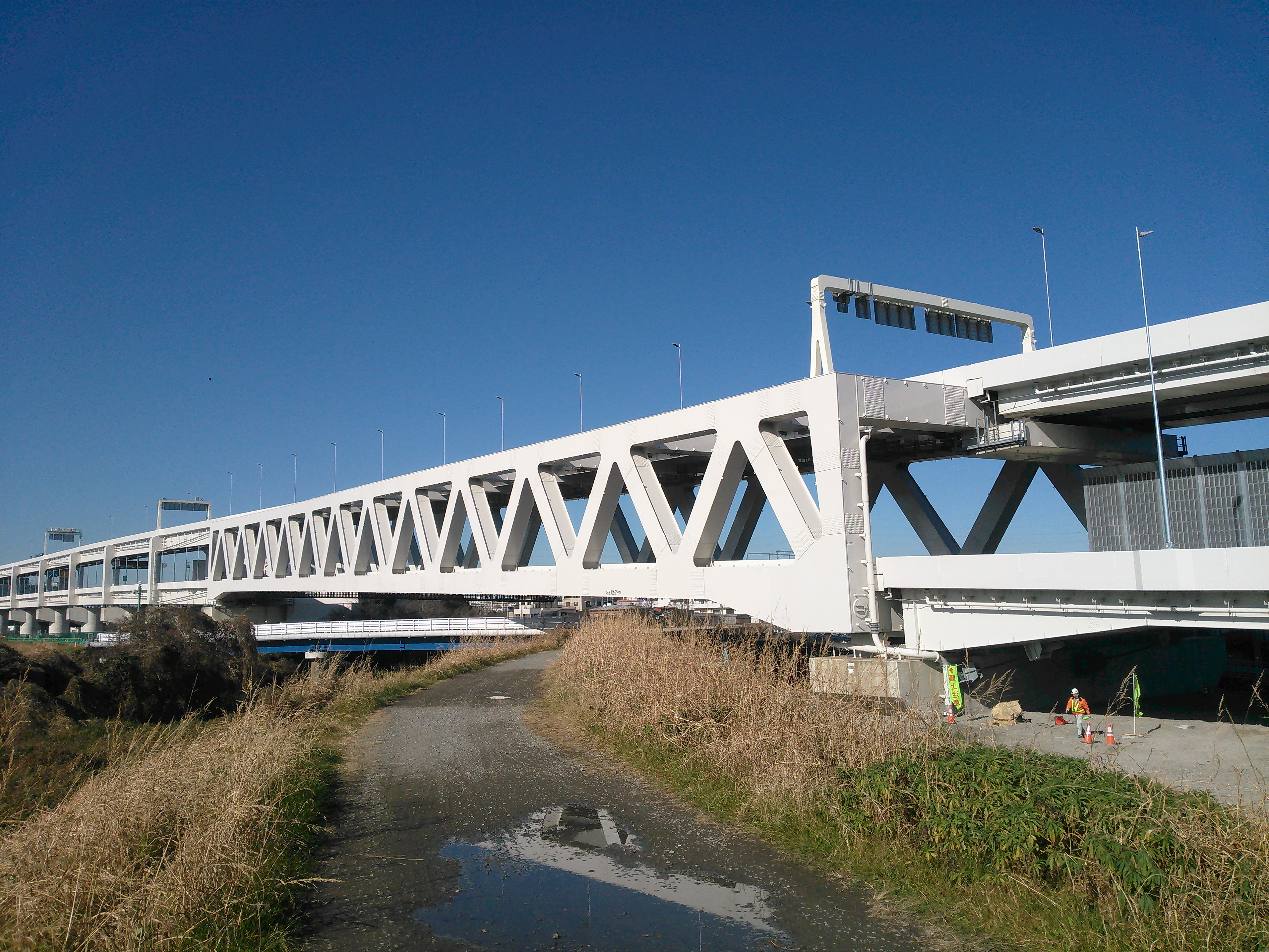 横浜市都筑区・港北区、大熊川トラス橋。